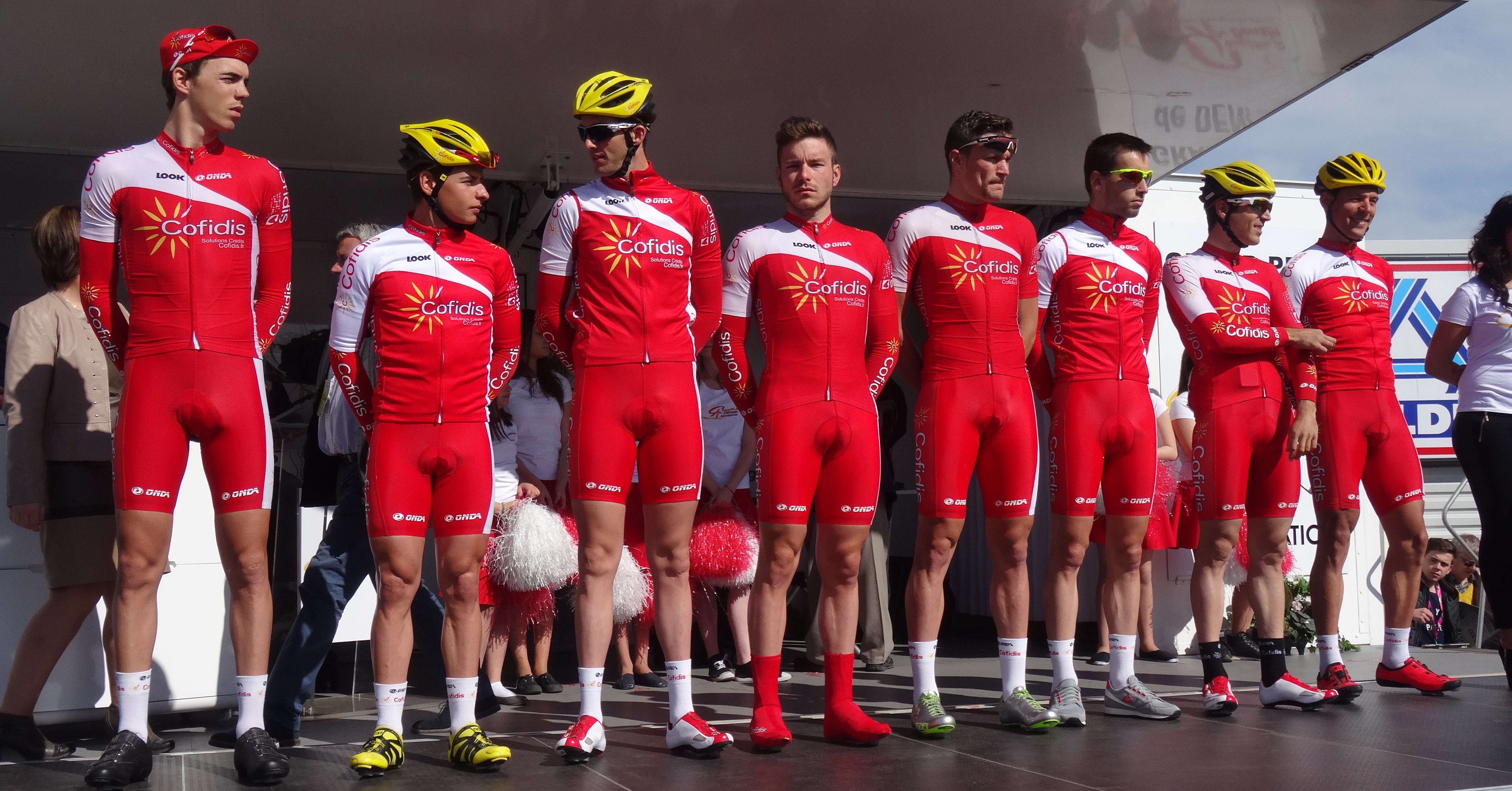 Reportage réalisé le jeudi 17 avril à l'occasion du départ et de l'arrivée du Grand Prix de Denain 2014 à Denain, Nord, Nord-Pas-de-Calais, France.